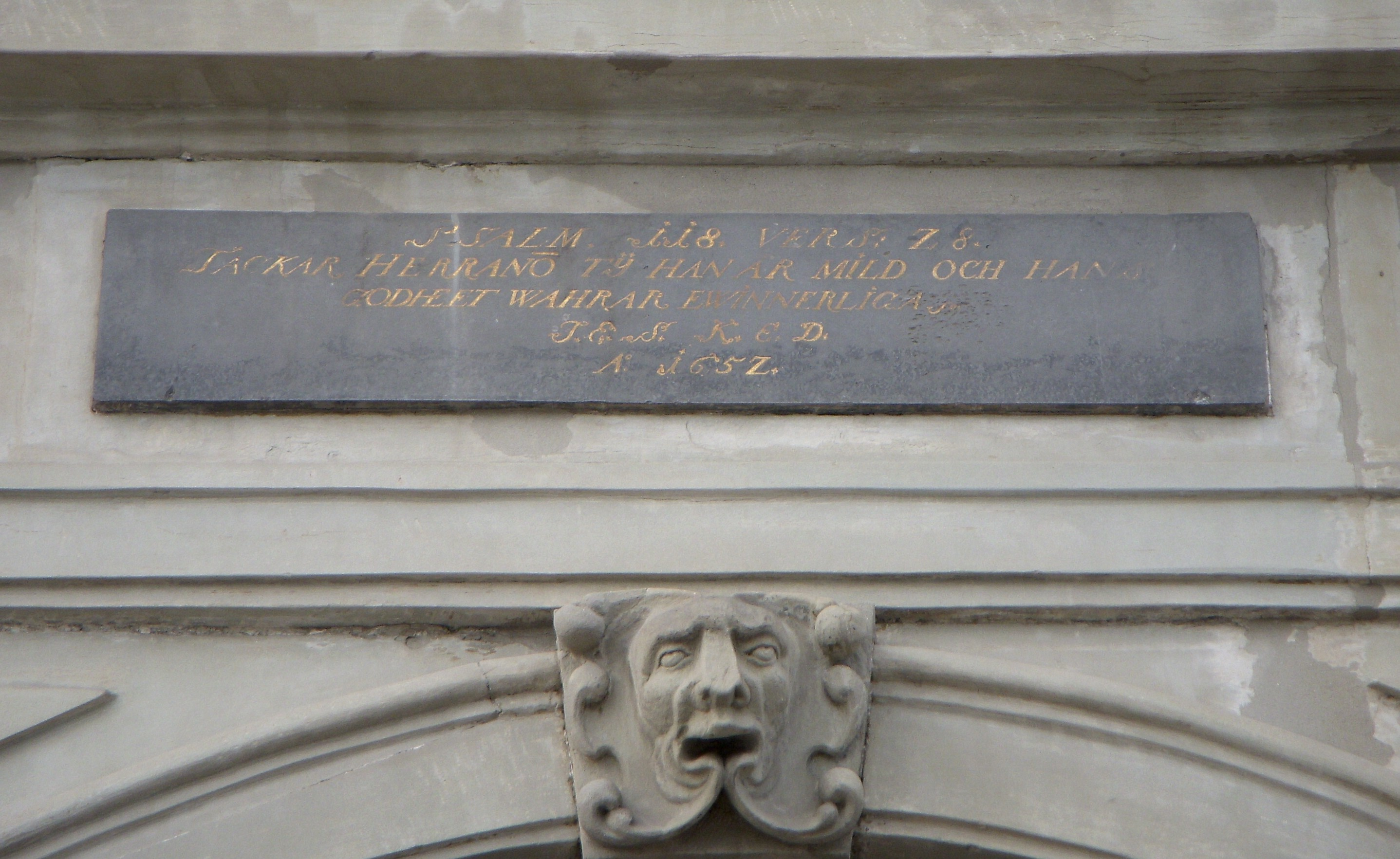 Skeppsbron 6, Stockholm, skylt över porten